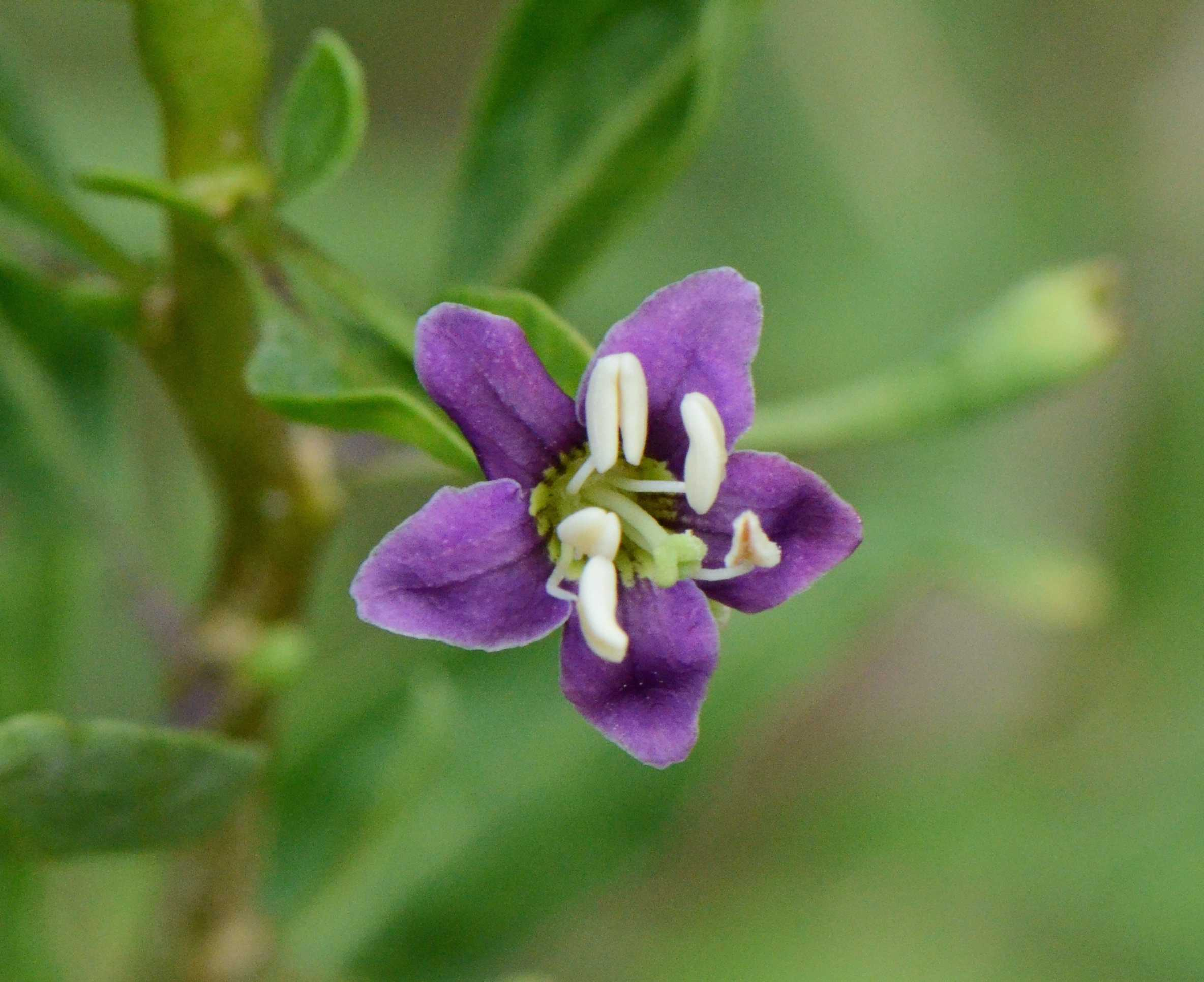 Lycium barbarum, fleur, Jardin des Plantes (Ecole de Botanique), Paris